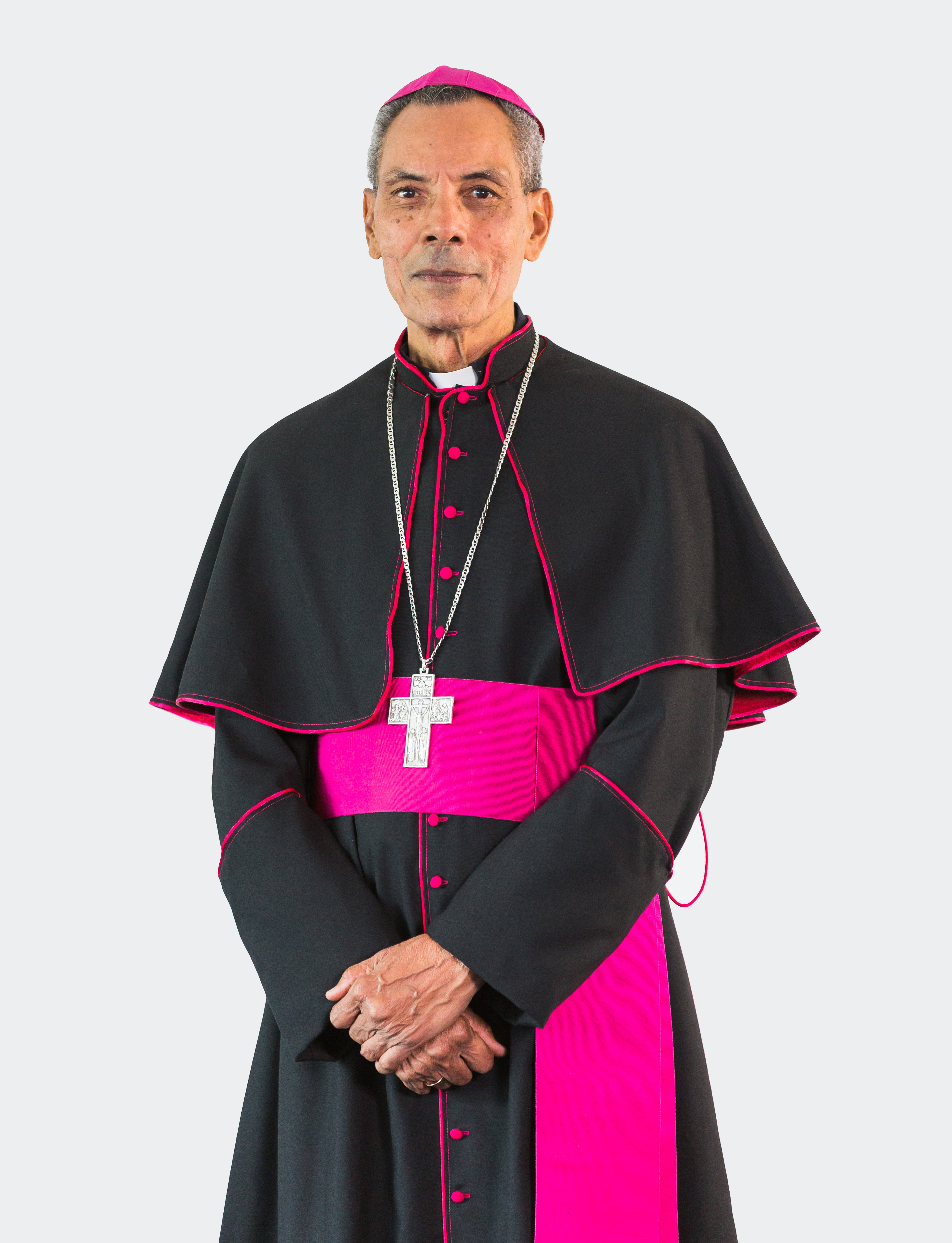 Obispo Rafael Felipe Núñez